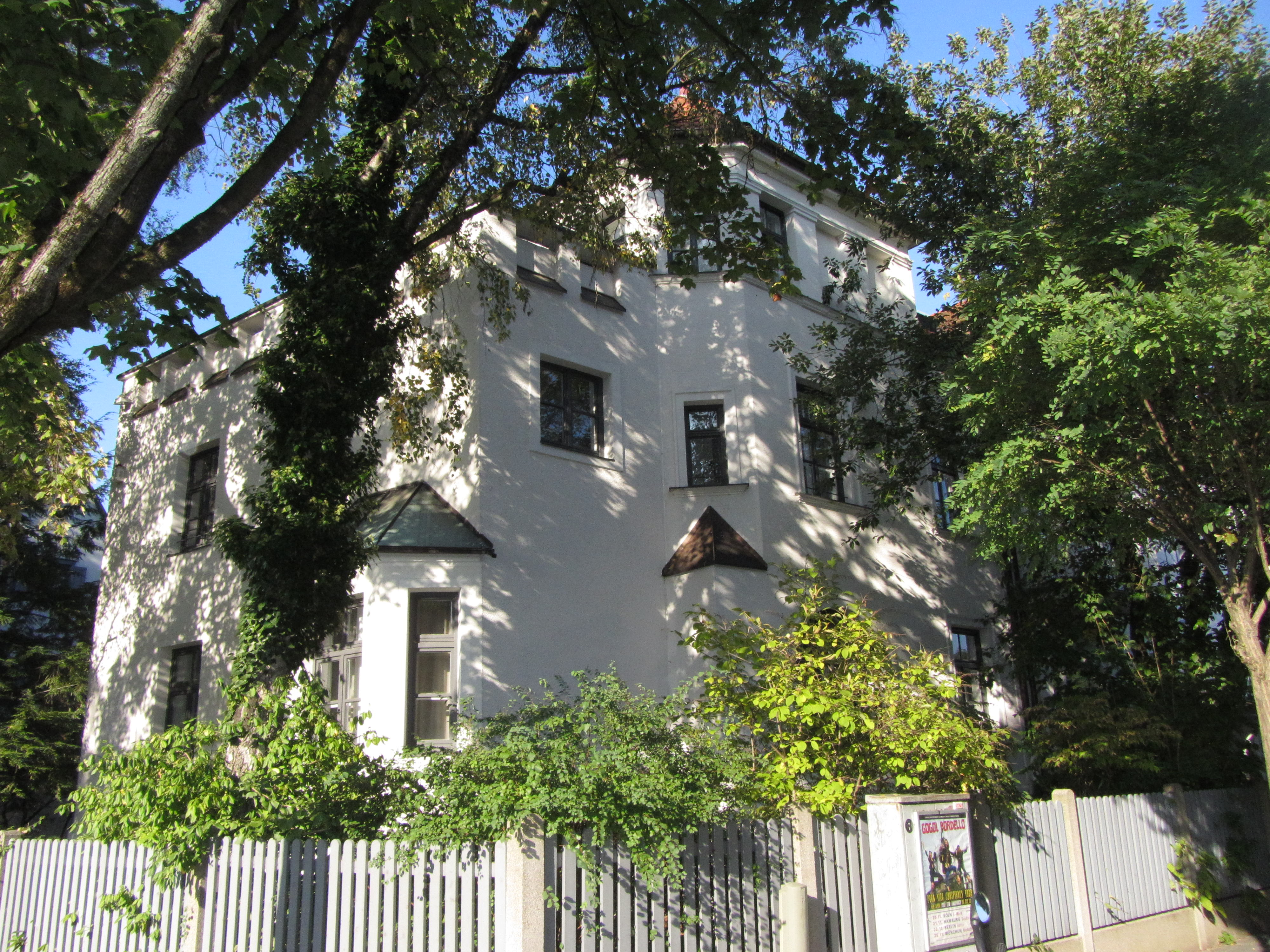 Denkmalgeschütztes Haus in Gern, München. This is a photograph of an architectural monument.